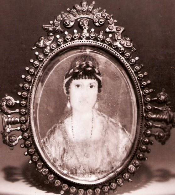 Teresa de Jesús Cepeda y Chamorro de Barrundia, madre de José Francisco Barrundia.